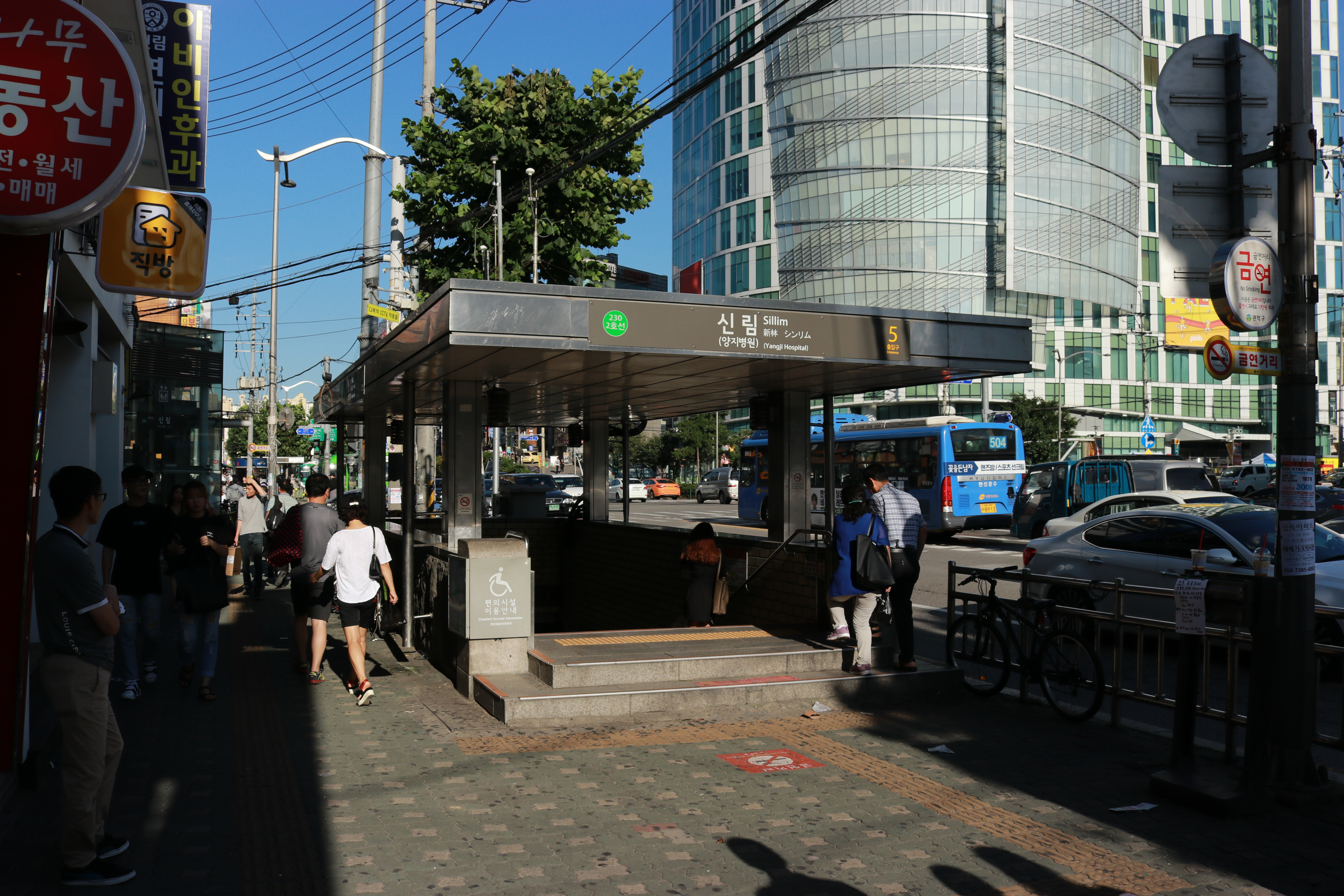 신림역 5번출구